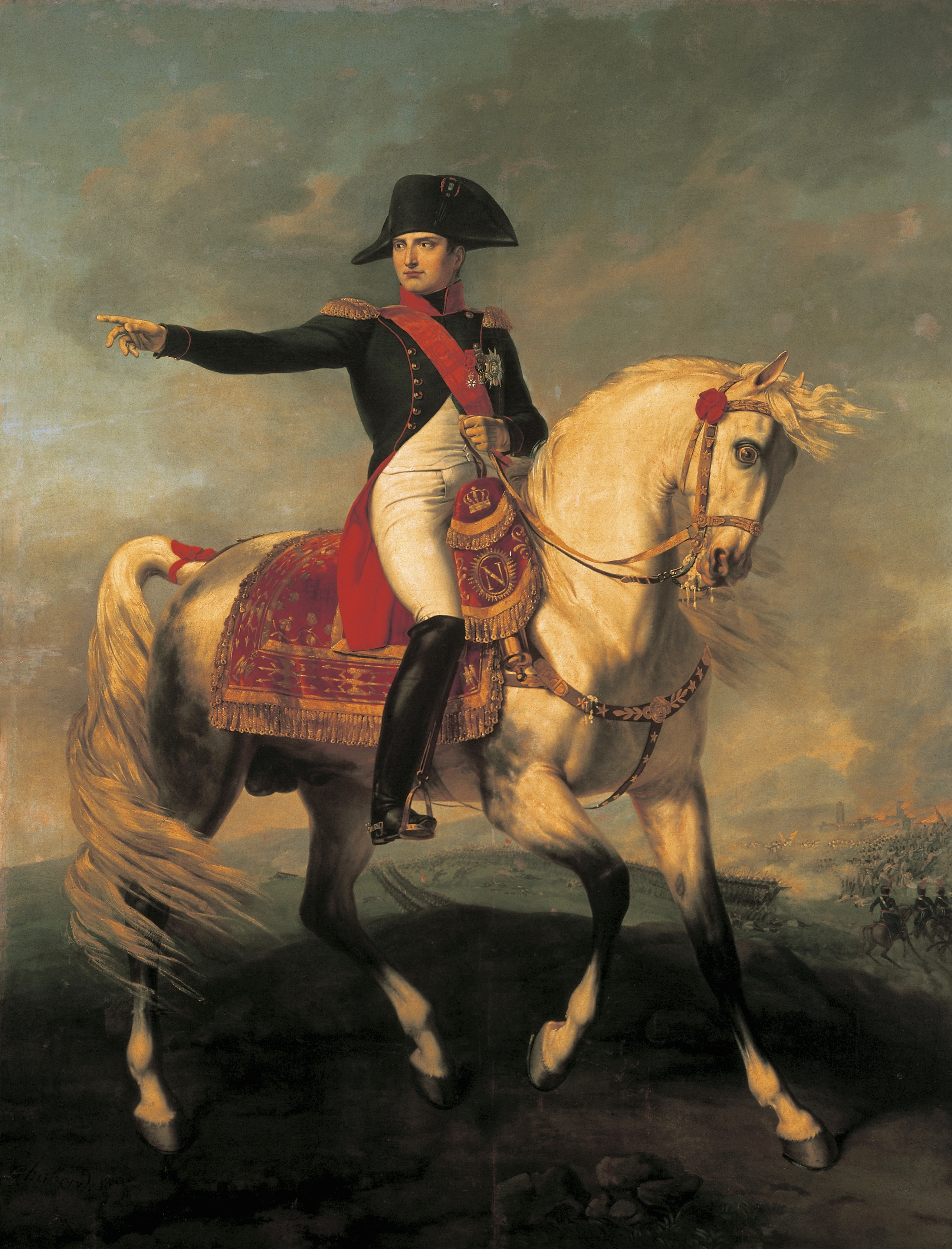 Portrait de Napoléon à cheval tendant le bras au sommet d'une colline